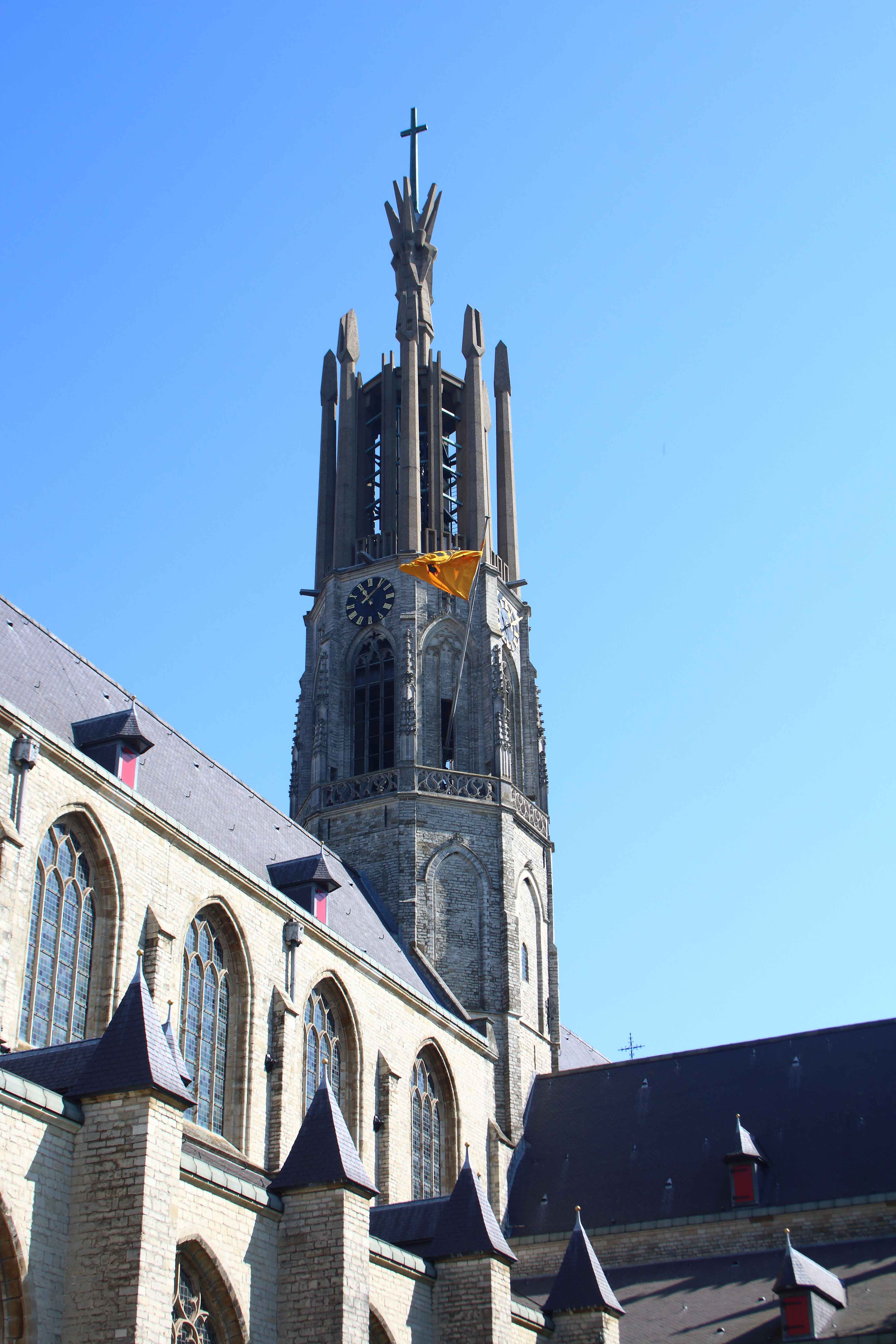 Sint-Willibrordusbasiliek, Hulst, Zeeuws-Vlaanderen, Zeeland, Nederland